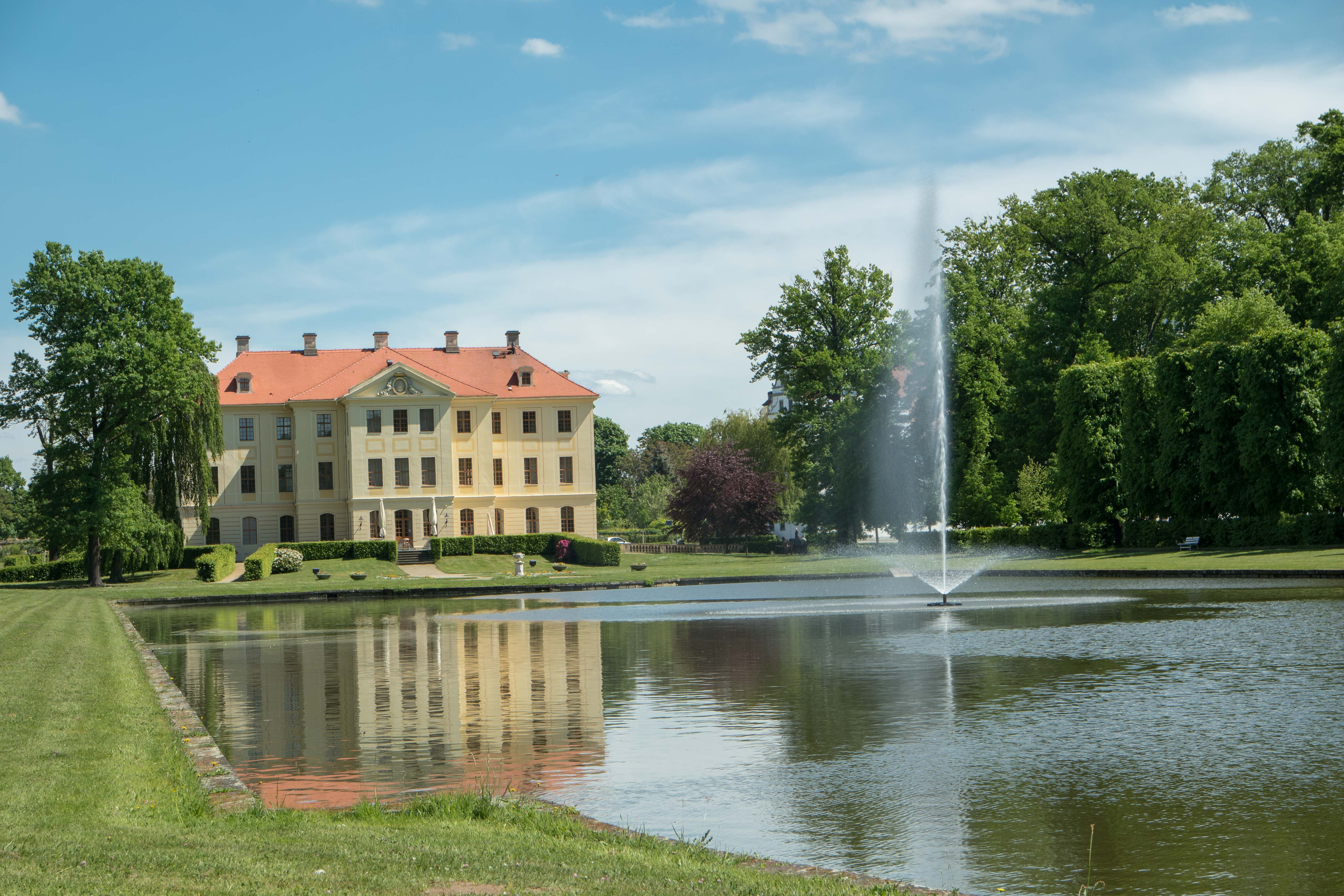 Spiegelteich im Barockgarten Zabeltitz